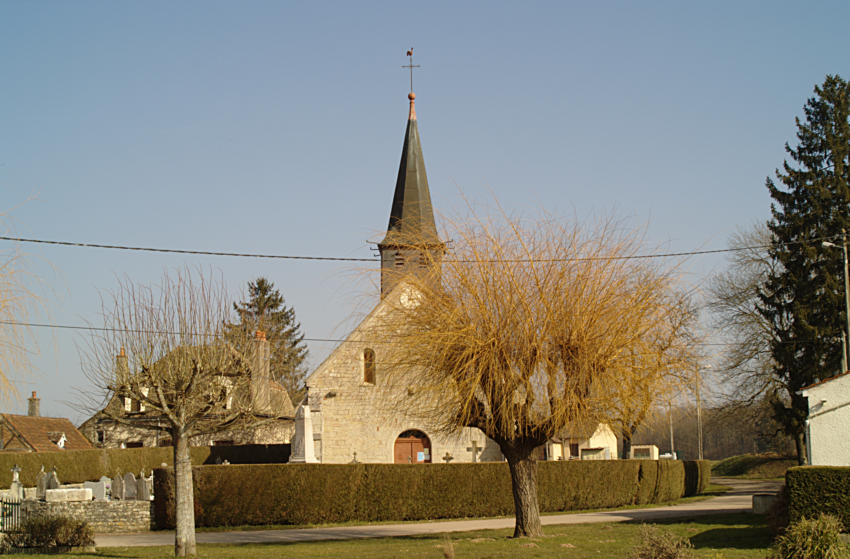 Église Sainte-Marie-Madeleine, Lanthes (Côte d'Or, Bourgogne, France)